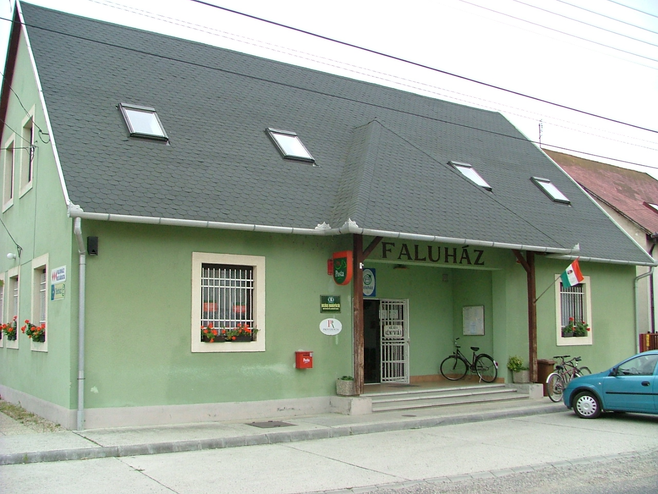 A győrújfalui faluház a postával és a teleházzal